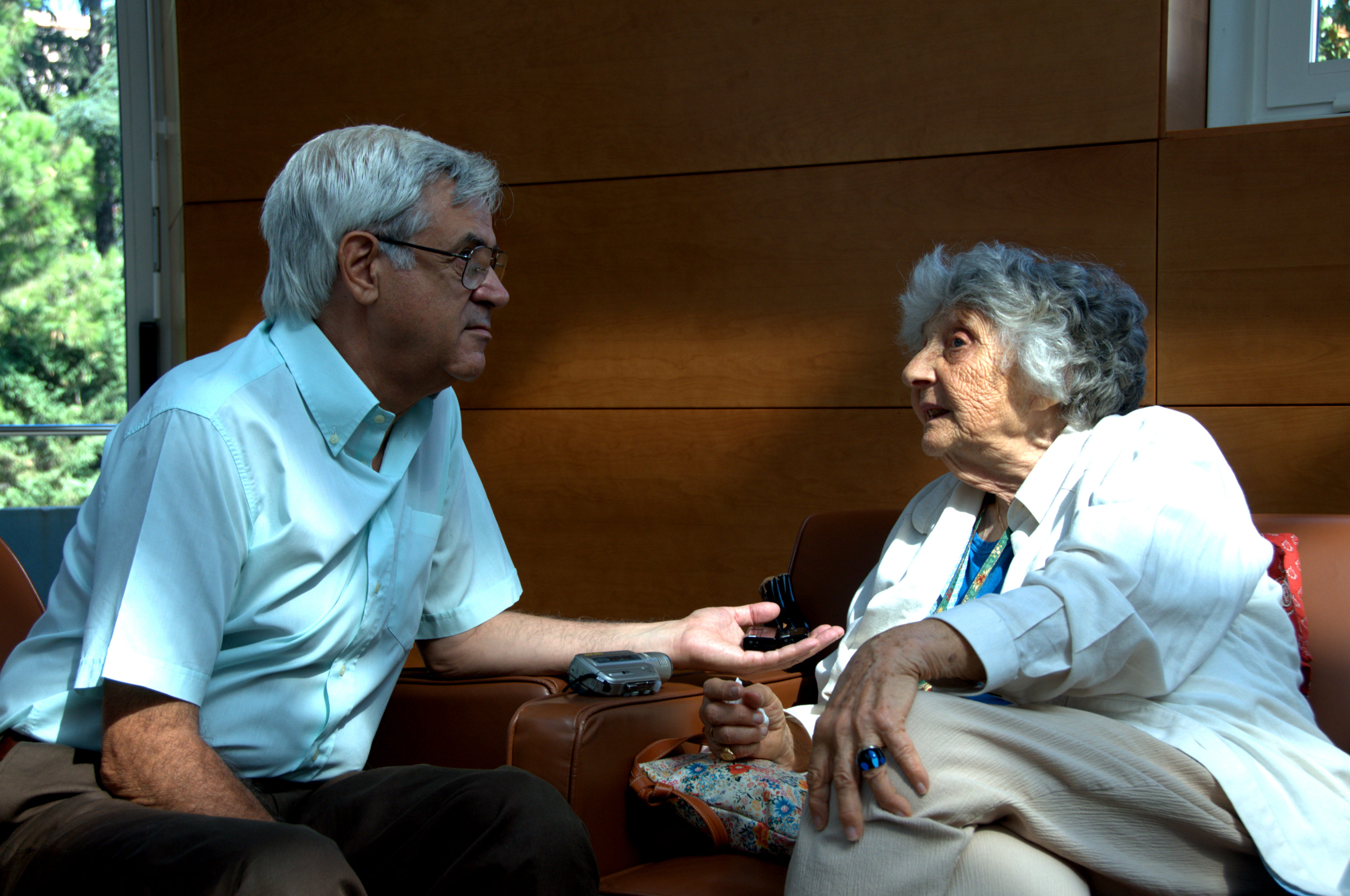 La professoressa Anne Schützenberger intervistata dall'editore romano Di Renzo durante il convegno di psicologia che si è svolto a Roma ad ottobre 2009